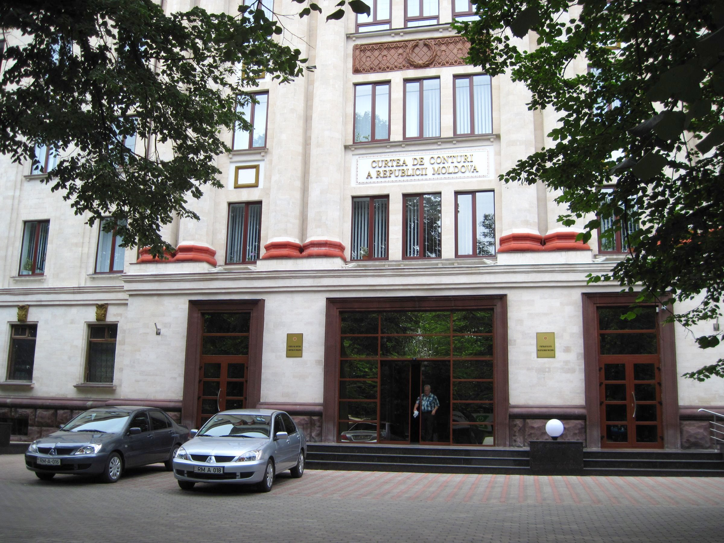 Curtea de Conturi a Republicii Moldova